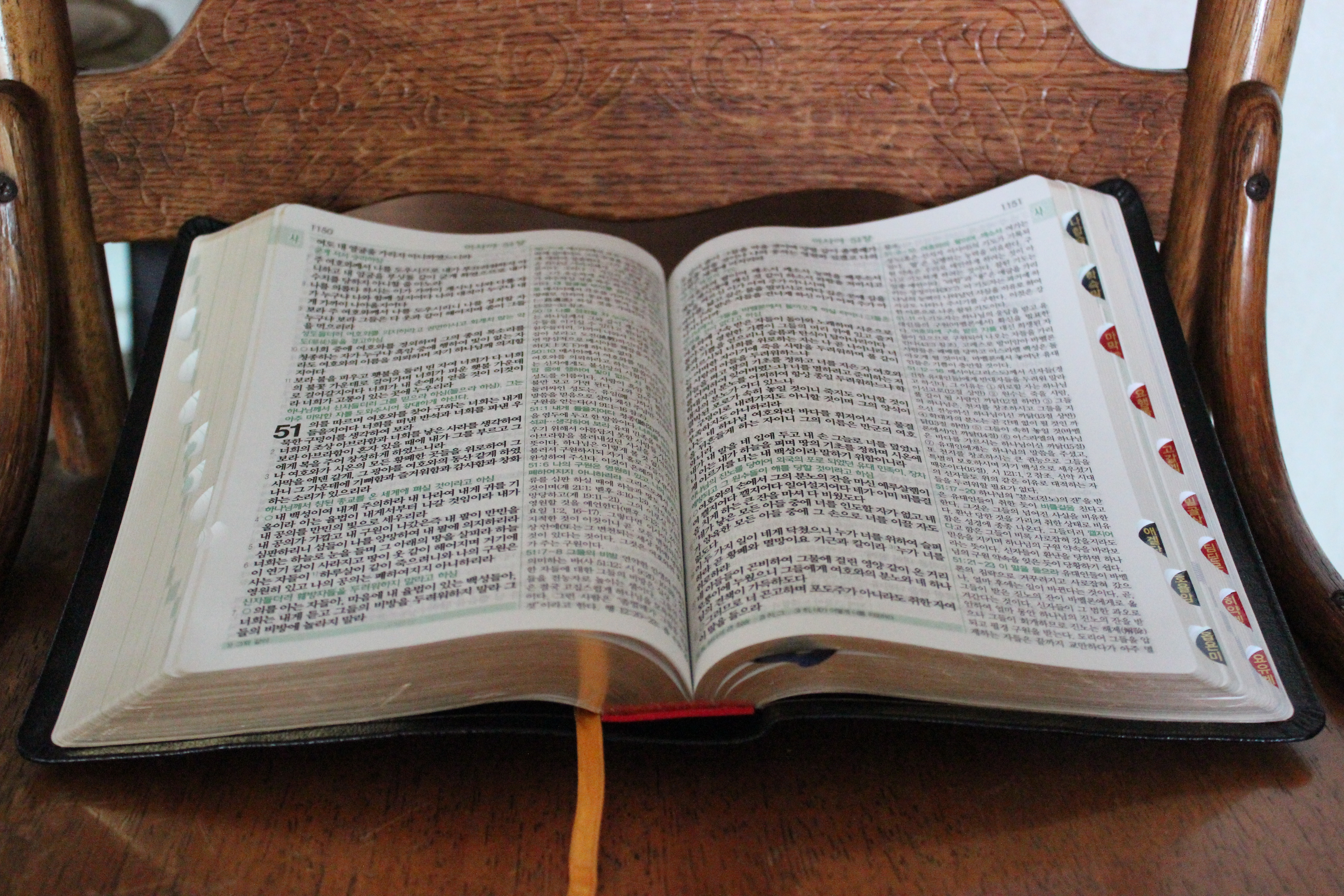 신구약 성경 (박윤선 박사 주석성경)